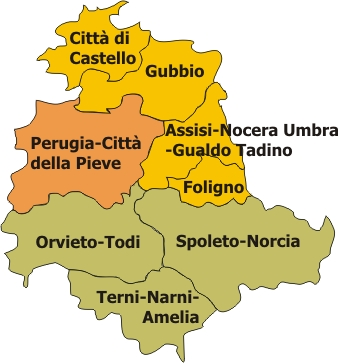 Mapa de la regió eclesiàstica Umbria